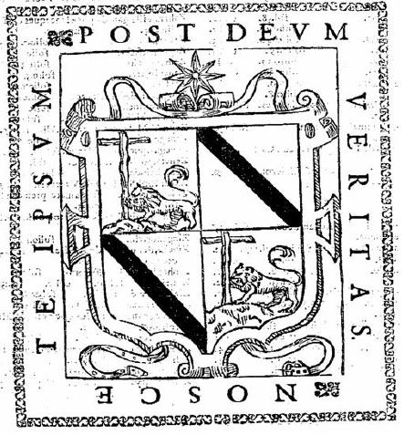 Blacon de Luys del Marmol Carvajal